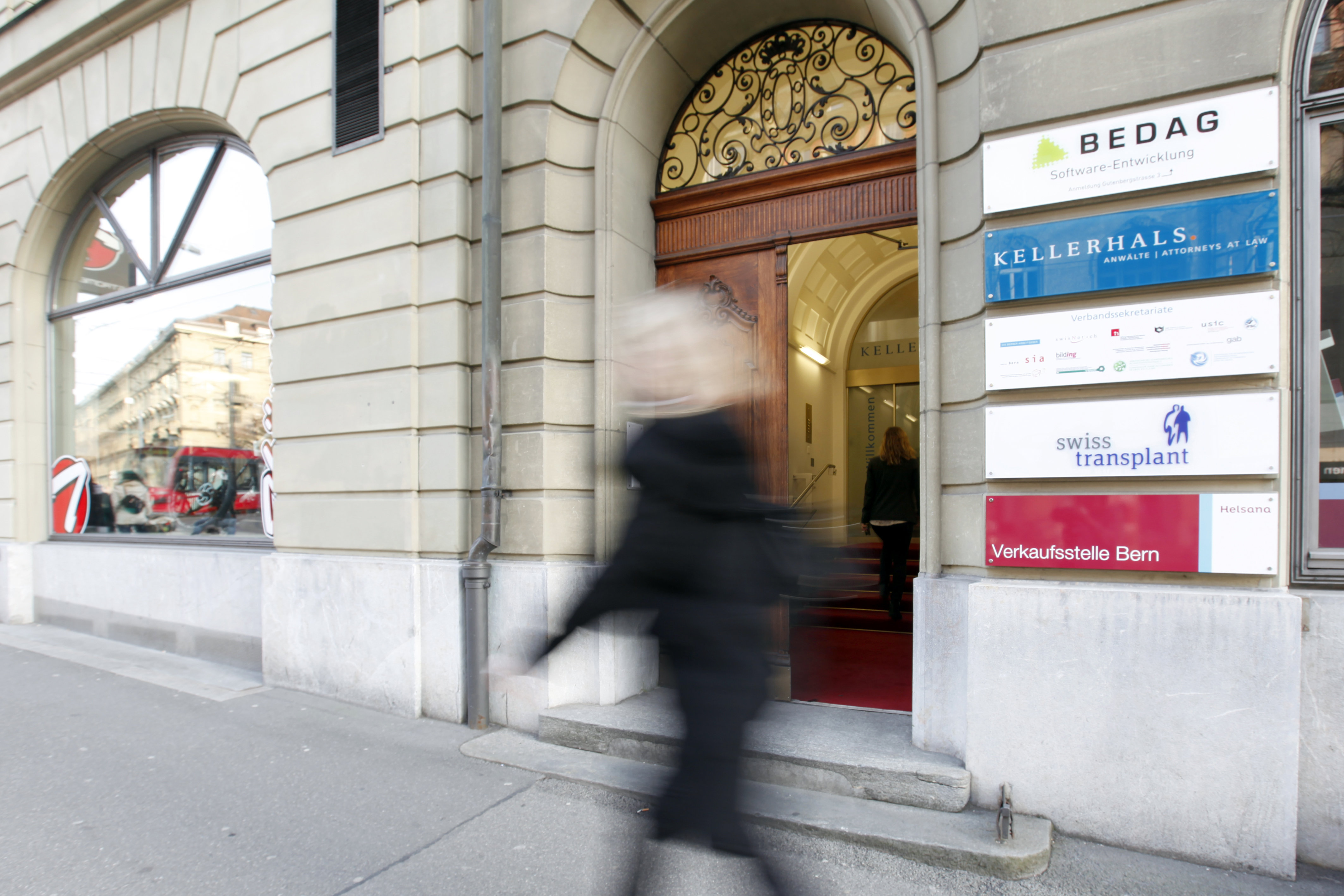 Geschäftsstelle Swisstransplant in Bern